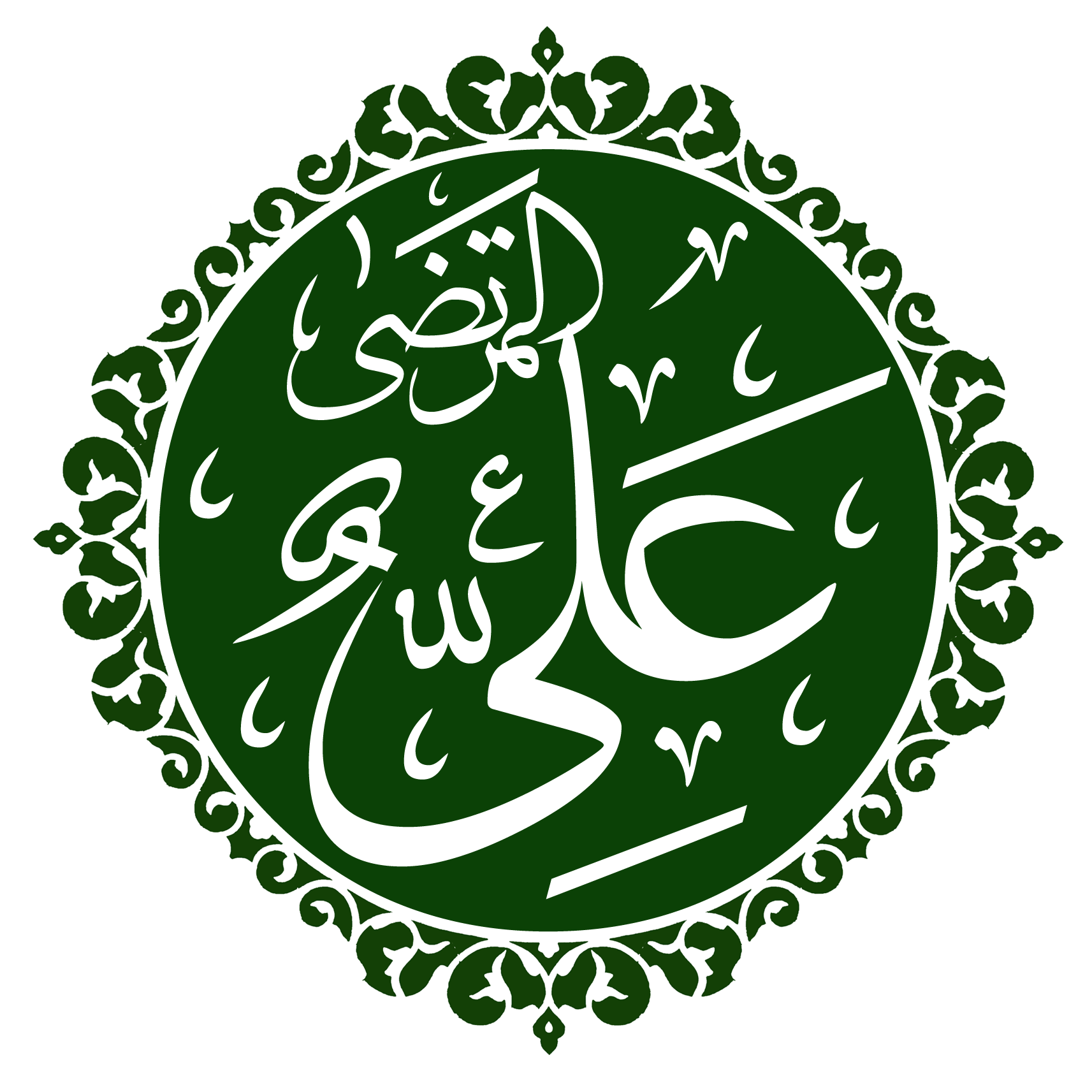 علی بن ابی طالب امام اول شیعیان